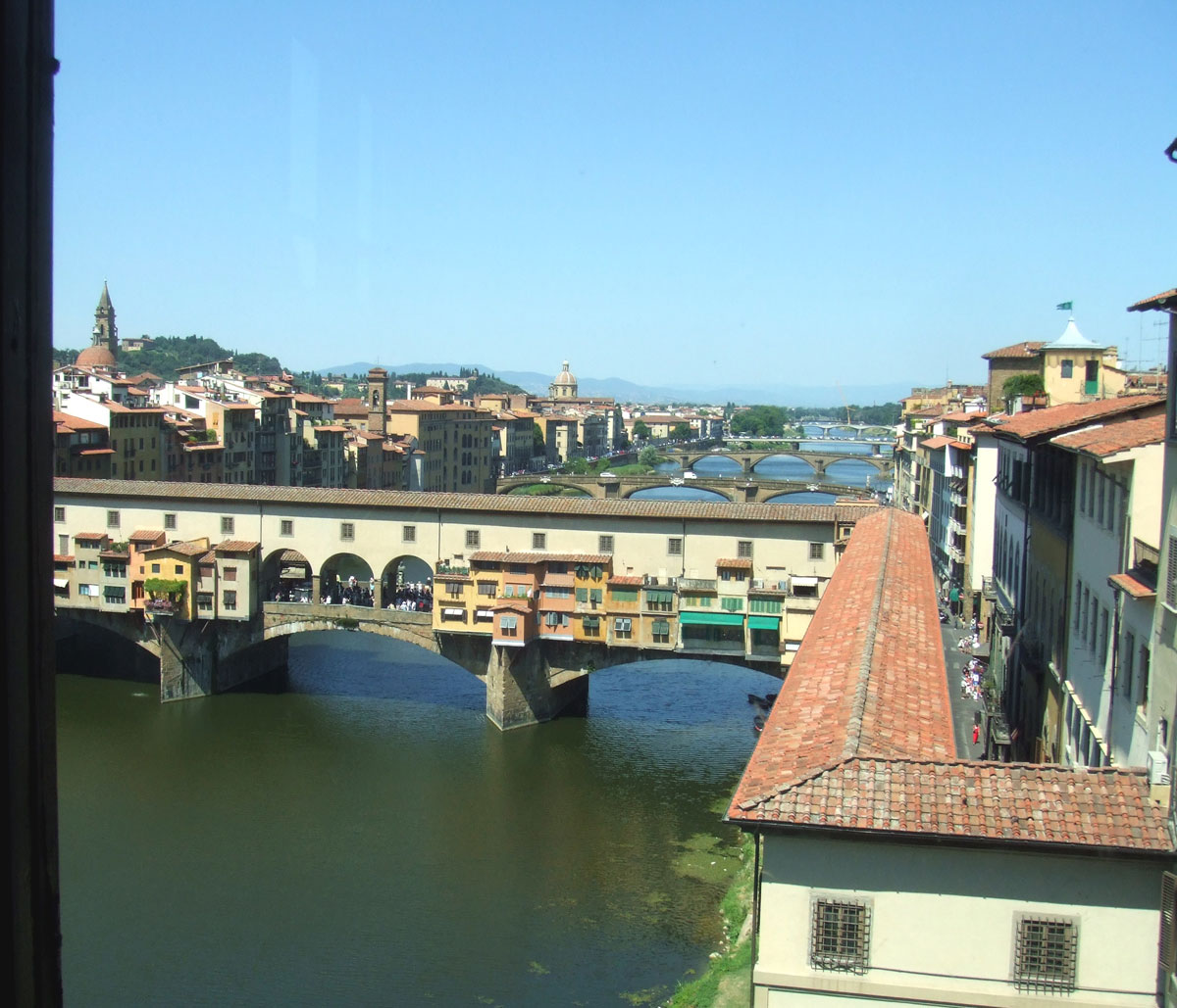 View from Corridor de Vasari depuis les Offices à Florence (Toscane- Italie)